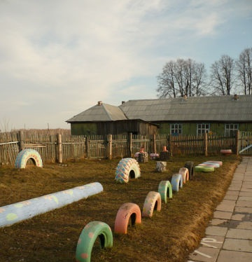 Детский сад в посёлке Северная Кузнечиха